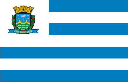 Bandeira do Município de Águas da Prata